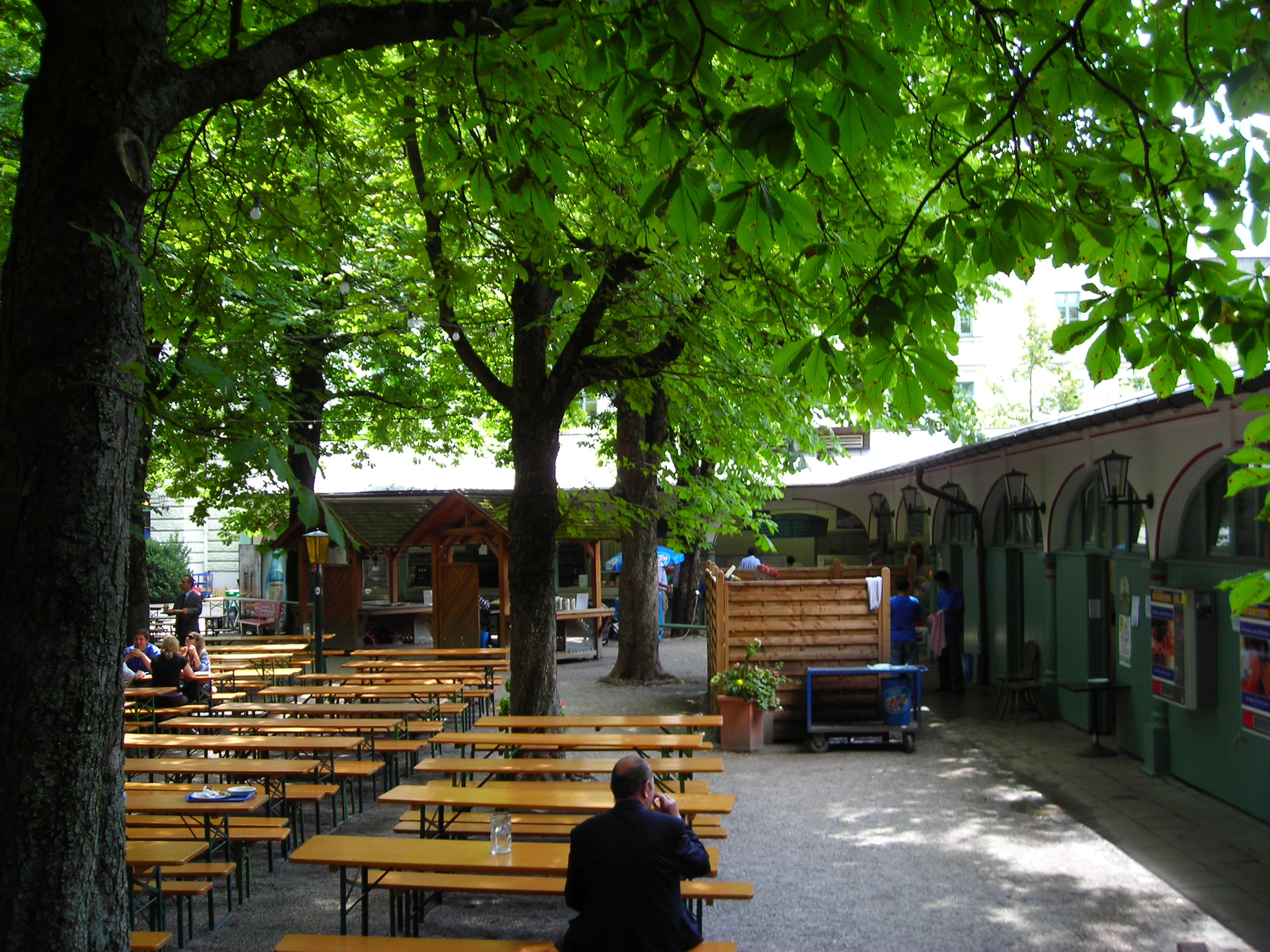 Hofbräukeller München, Arkaden nebst dem Biergarten